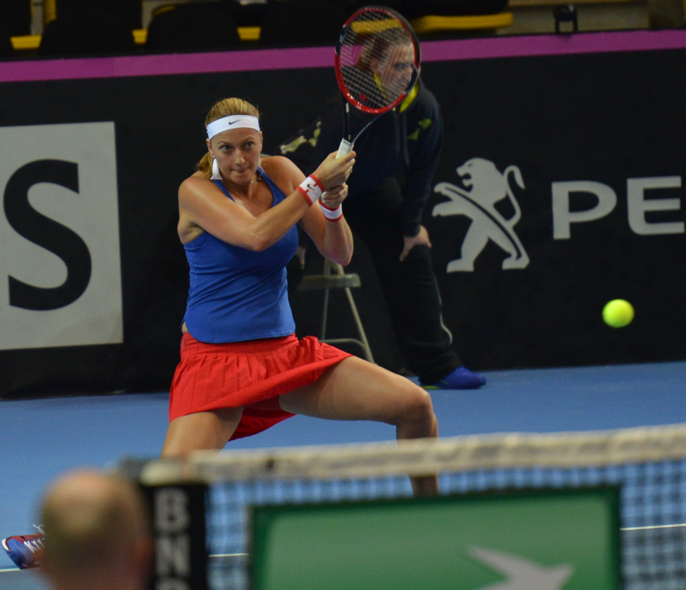 PPP_3096